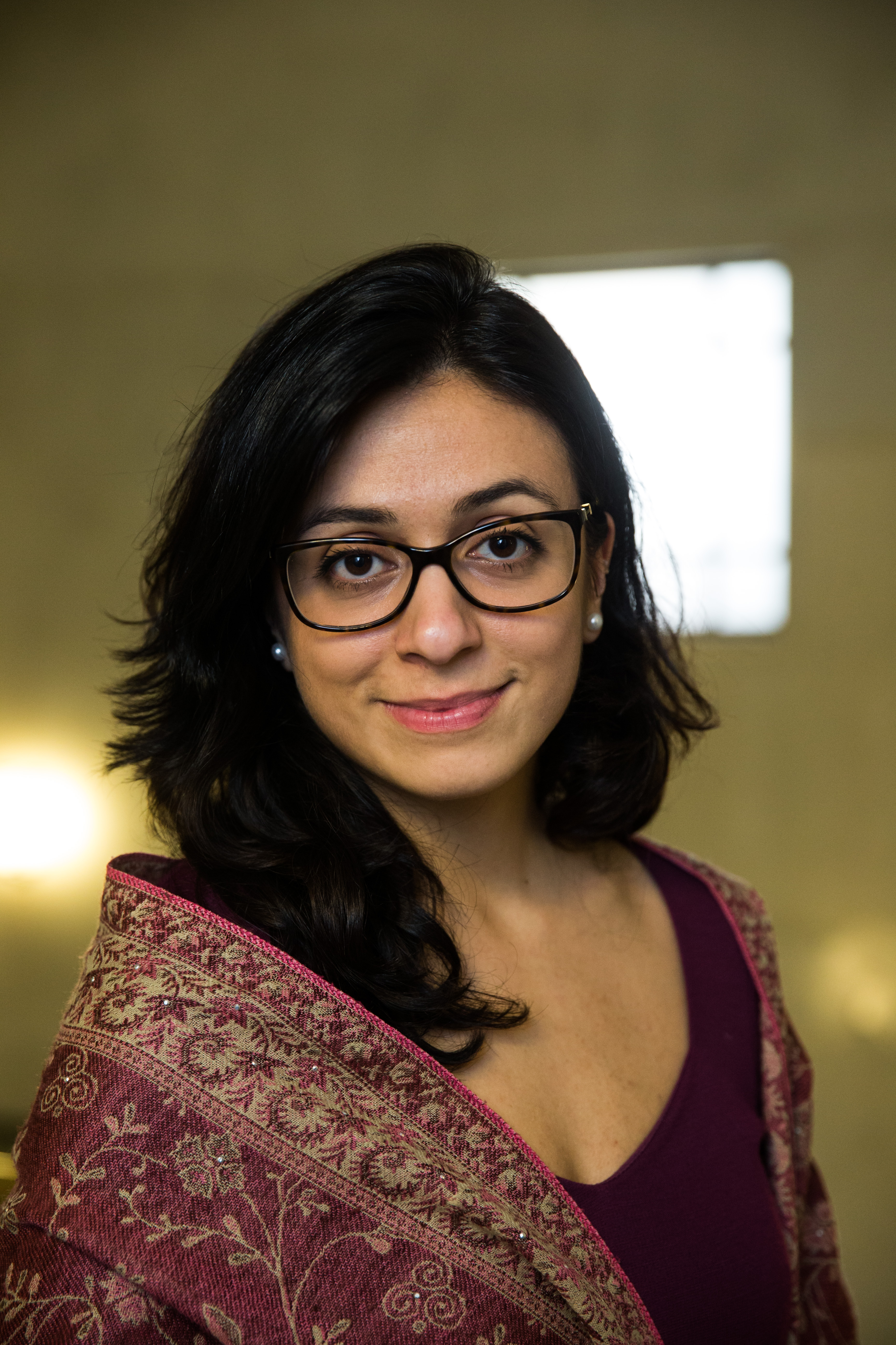 Nordiska rådets session i Helsingfors 2012. Hadia Tajik